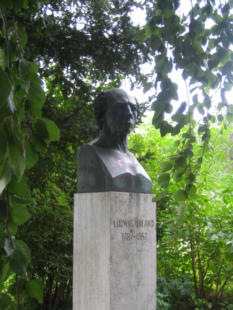 Uhlandbüste von Ernst Rau (1865) in Stuttgarter Liederhalle. Seit 1955 steht sie auf der Uhlandshöhe.